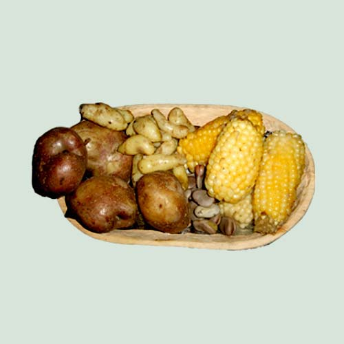 plato tipico Puerres